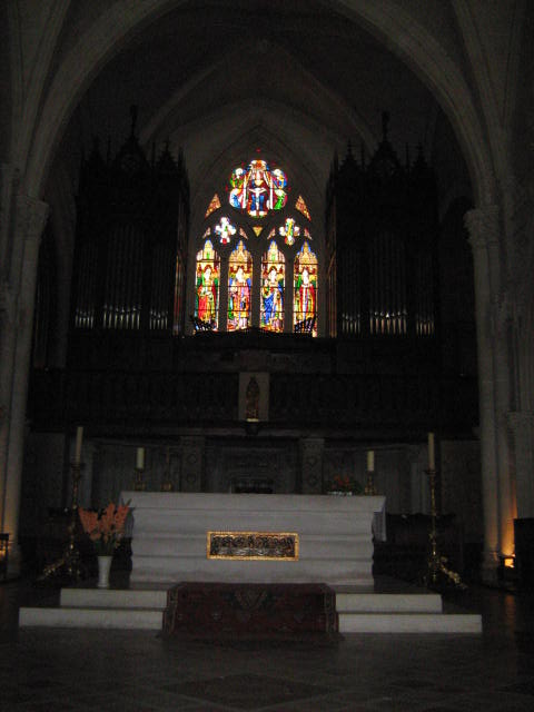 Vue du Choeur de l'église Saint-Léger de Cognac, avec le vitrail encadré par le double buffet d'orgue